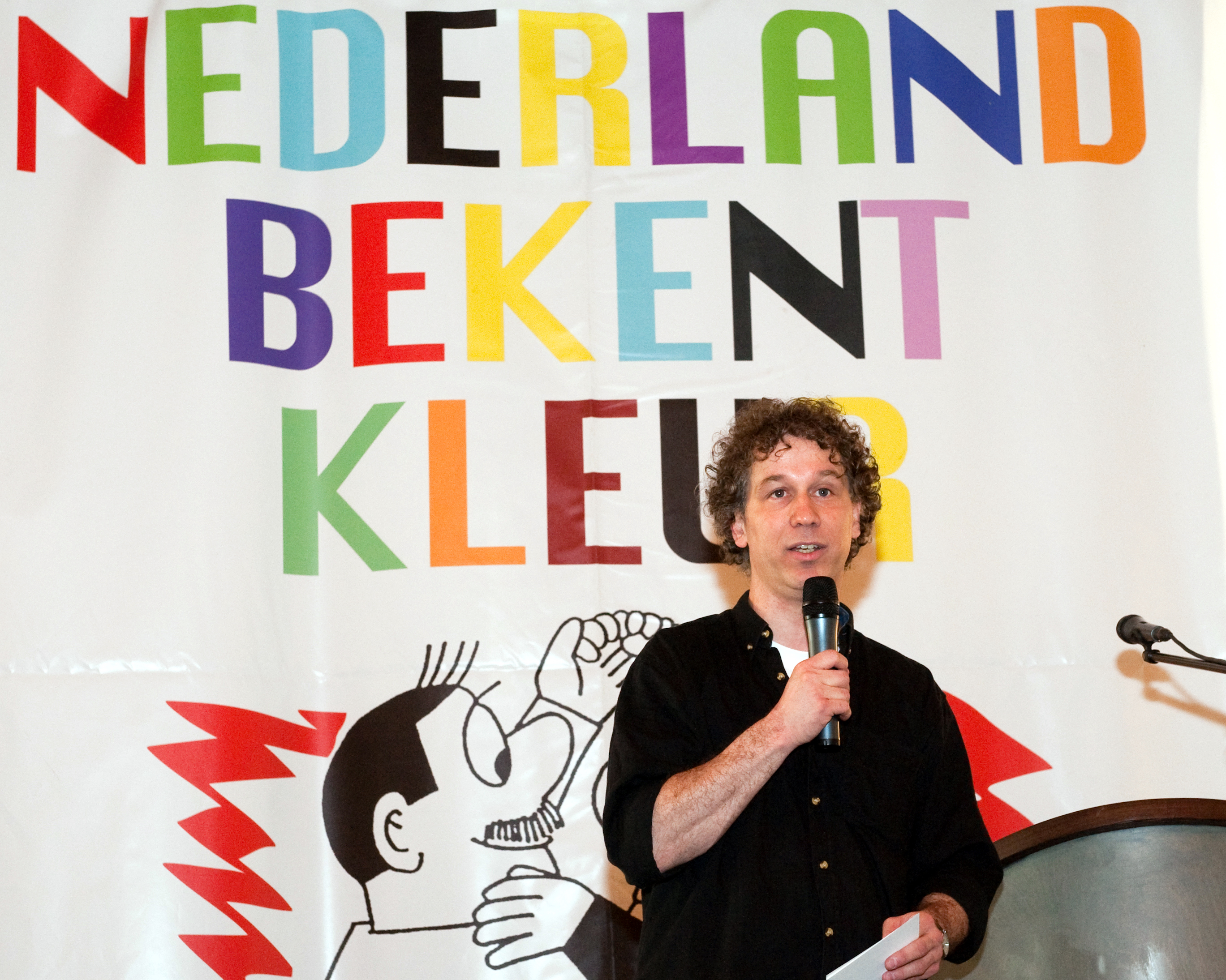 AMSTERDAM - Op zondagmiddag 21 maart was er een actie op de Dam in Amsterdam ter viering van de internationale dag tegen racisme van de Verenigde Naties. Daarvoor was er een bijeenkomst en debat in de Nieuwe Kerk. De sprekers waren o.a. Hedy D' Ancona, Mohammed Rabbae, René Danen en Volkskrant journalist Thomas von der Dunk. In heel Europa zijn rond 21 maart activiteiten in het kader van de International Day for the Elimination of All Forms of Racial Discrimination van de Verenigde Naties. De stichting Nederland Bekent Kleur organiseert sinds 1992 in ons land activiteiten rond de VN-dag.